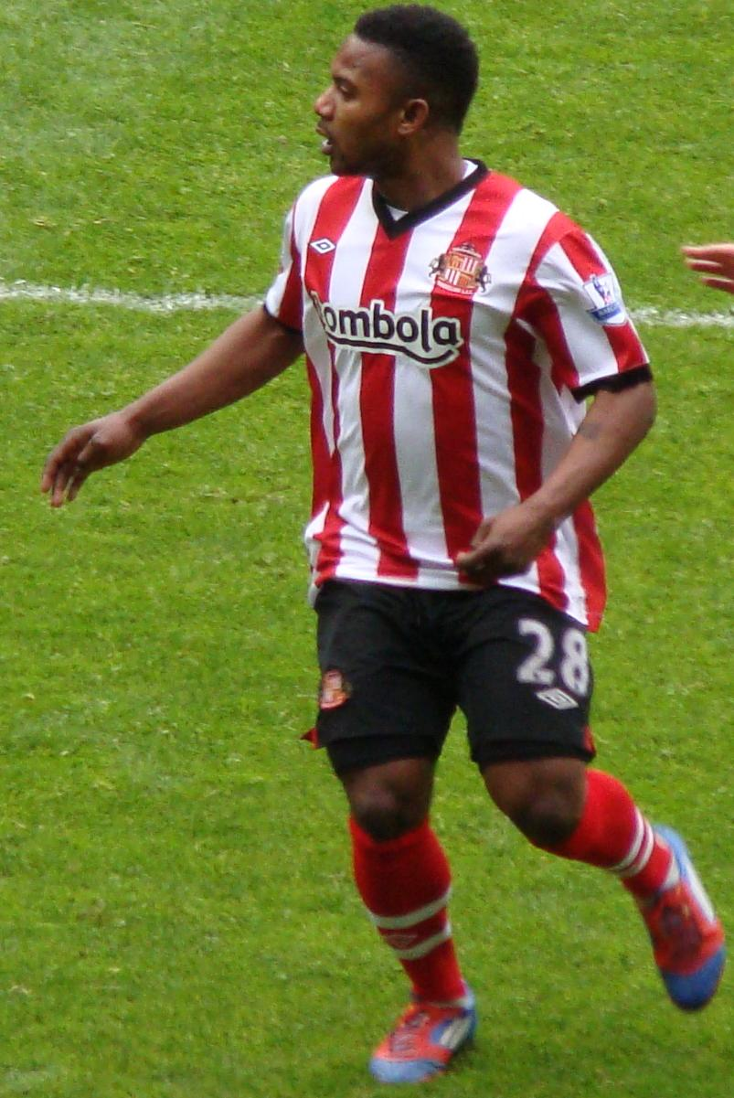 SAFC vs MUFC